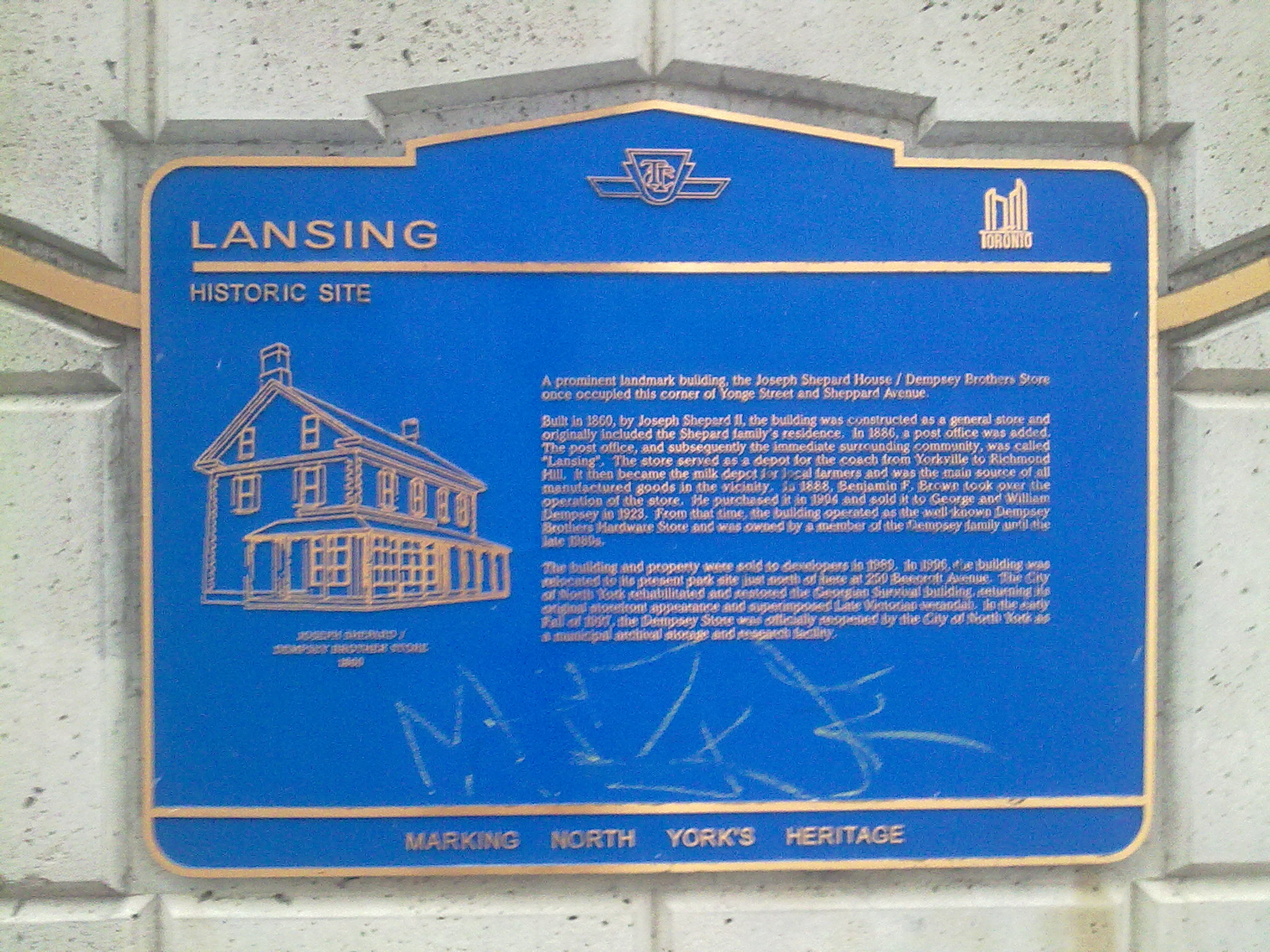 Placa em Toronto, Ontário, Canadá.